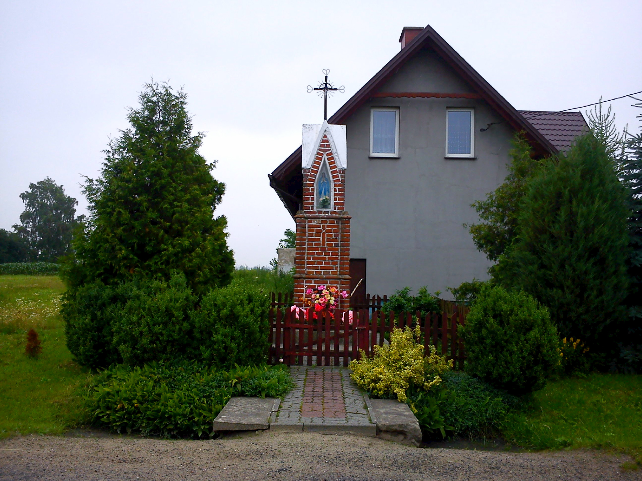 Kapliczka przydrożna w Piskorczynie, zbudowana w 1945 roku.